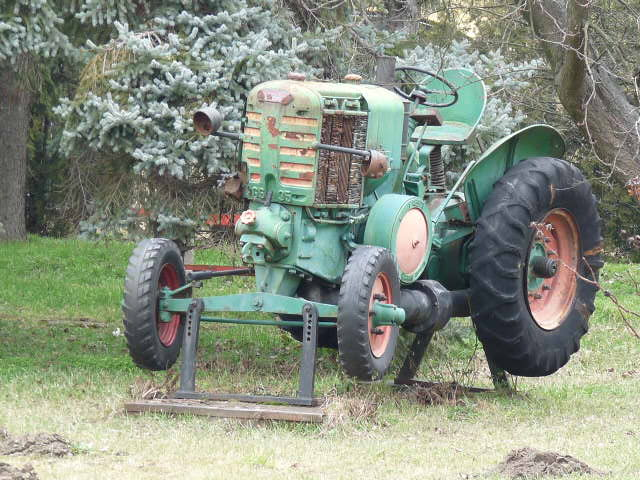 Hoffer-traktor